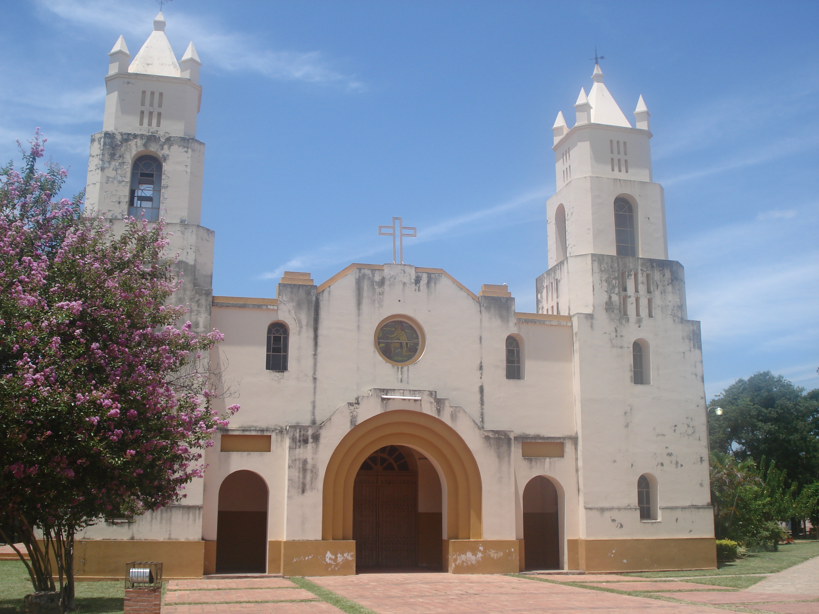 iglesia